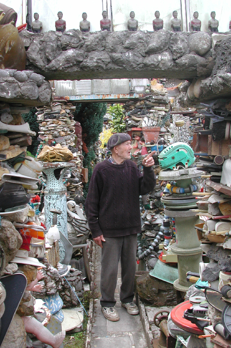 Bohdan litnianski au milieu des ses colonnes.